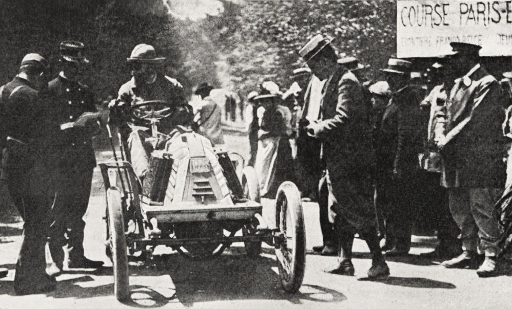 Marcel Renault lors du Paris-Berlin 1901 (frontière belge) - Le Sport universel illustré du 6 juillet 1901, p.435